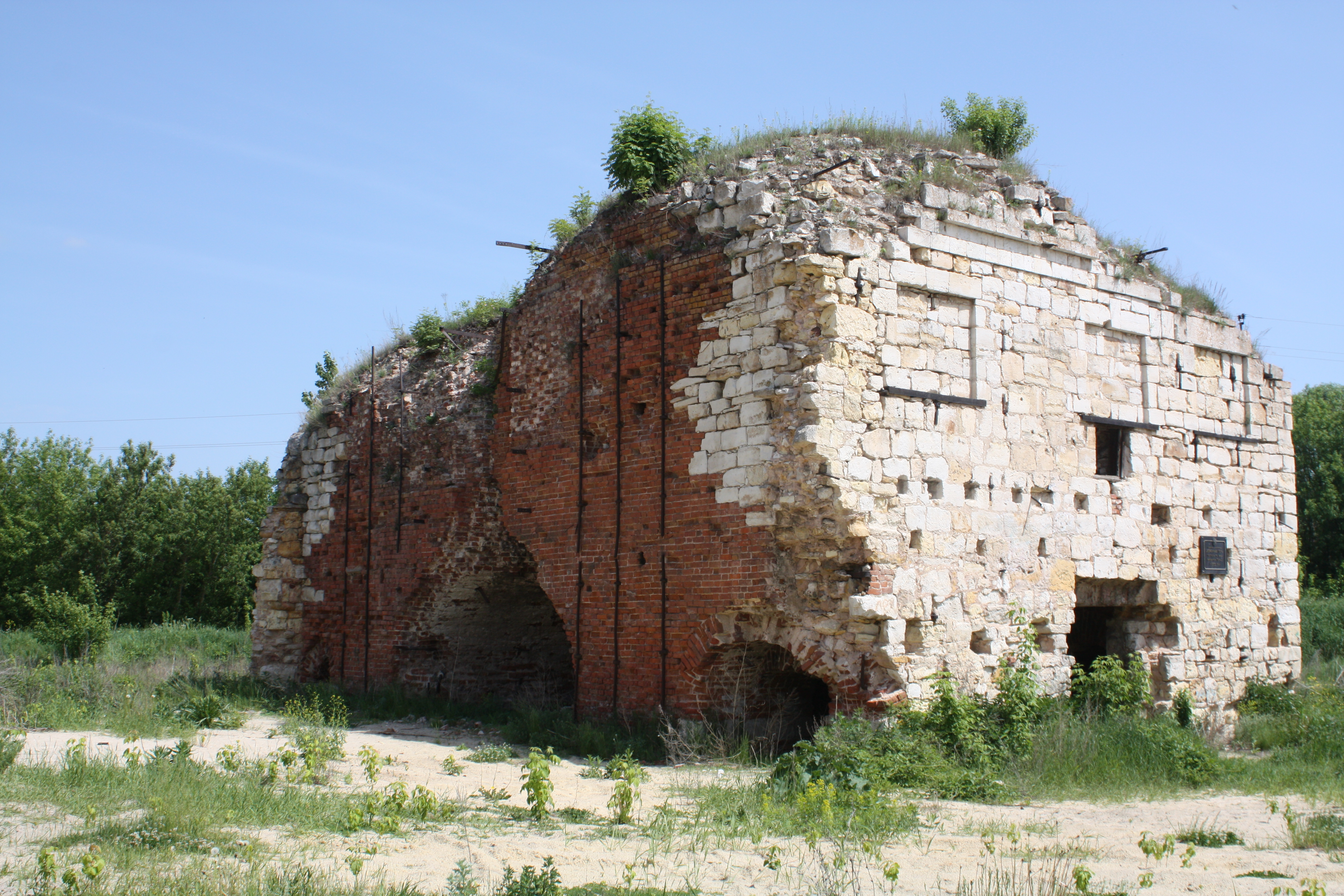 Доменная печь: Истье, Старожиловский район, Рязанская область